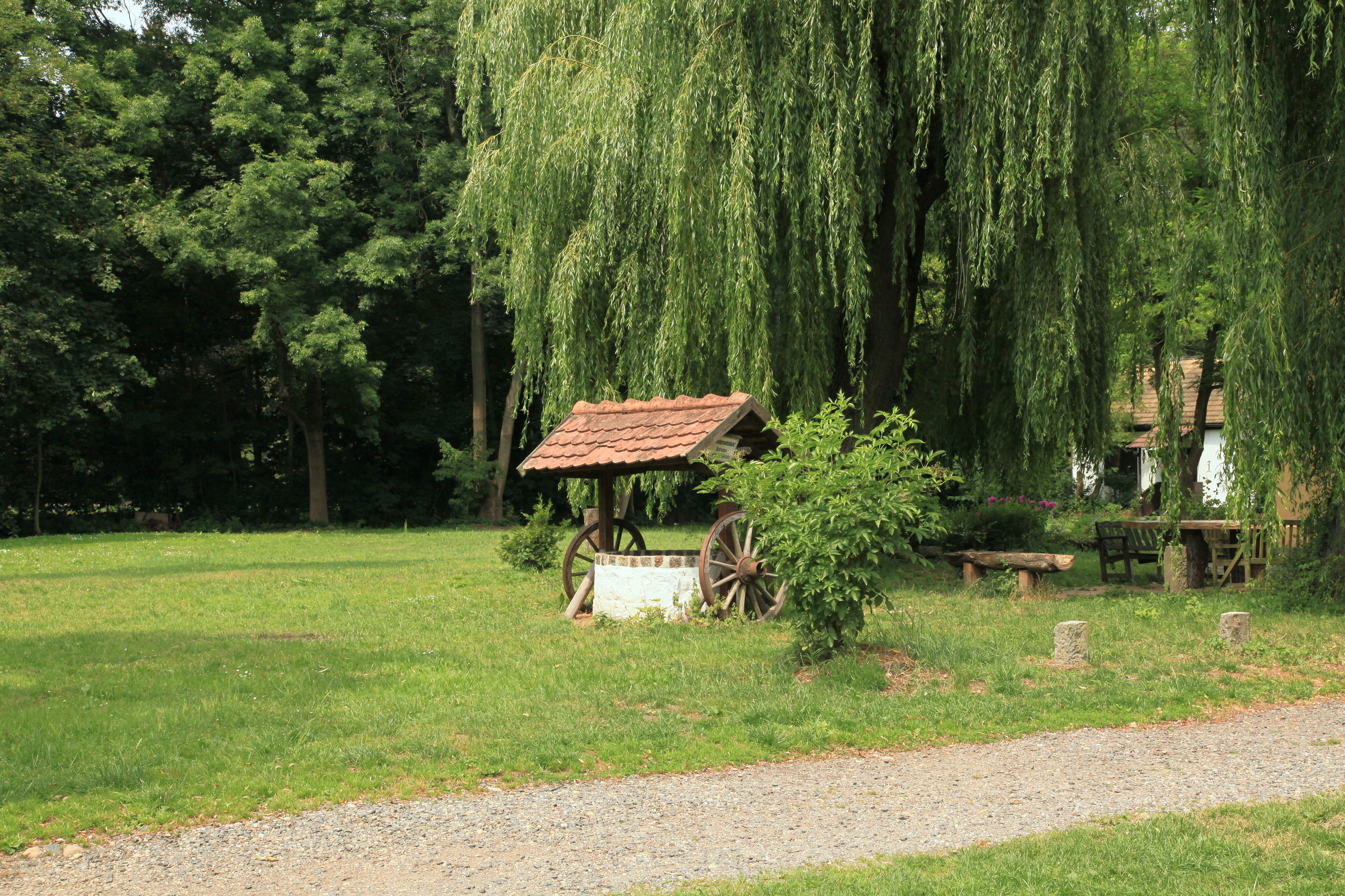 Goethe-Park in Leipzig